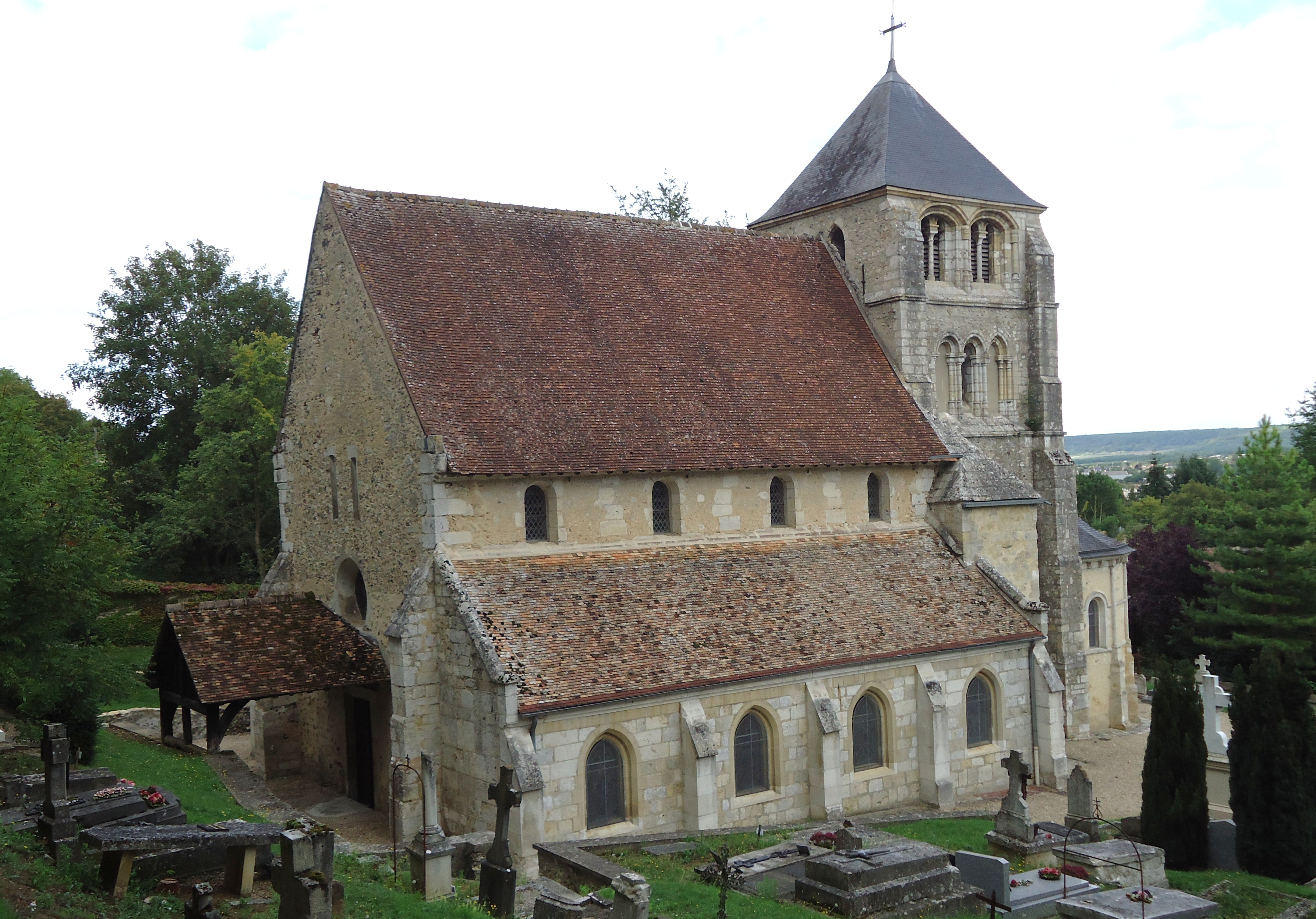 Eglise Saint-Georges XIIIe, XVe (ISMH)